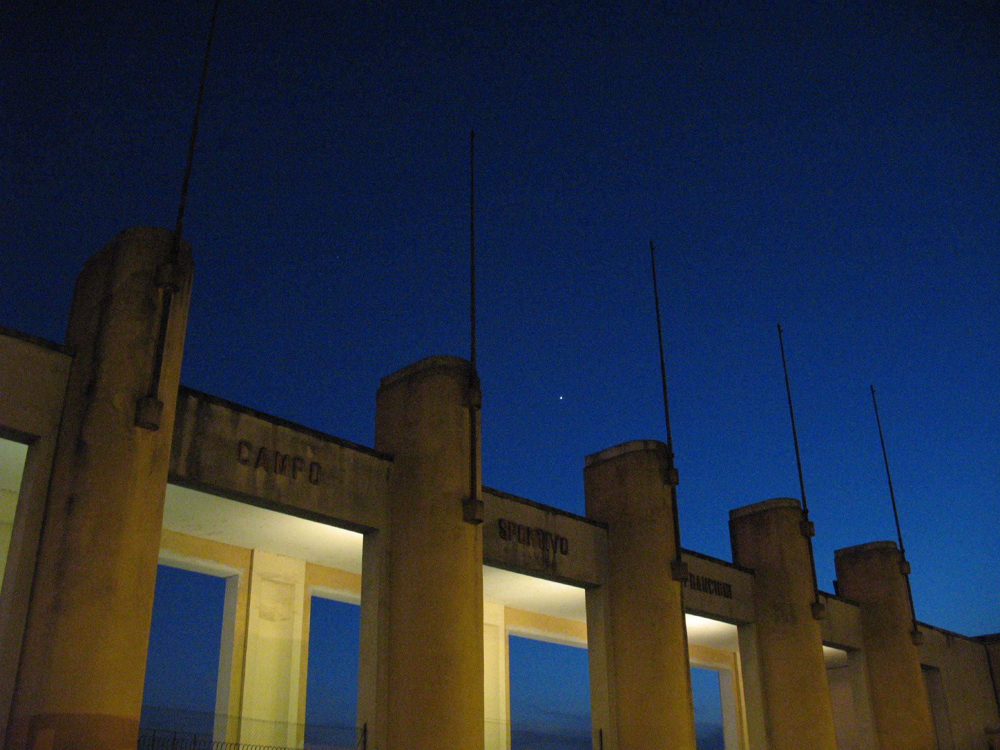 Stadio di Littoria